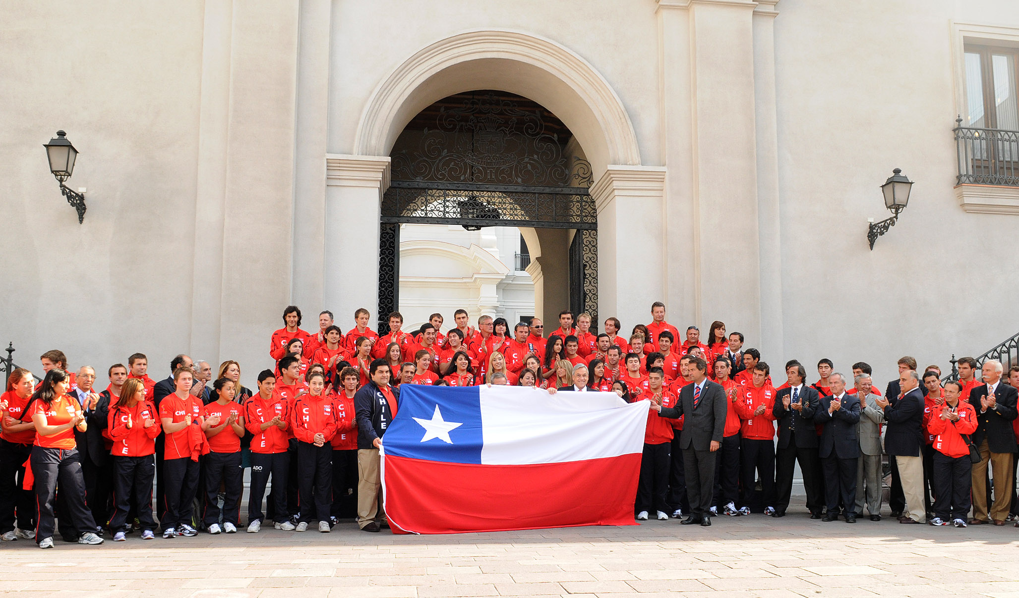 El presidente de Chile Sebastián Piñera recibe en el Palacio de La Moneda a la delegación chilena para los Juegos Panamericanos de 2011 en Guadalajara, México.